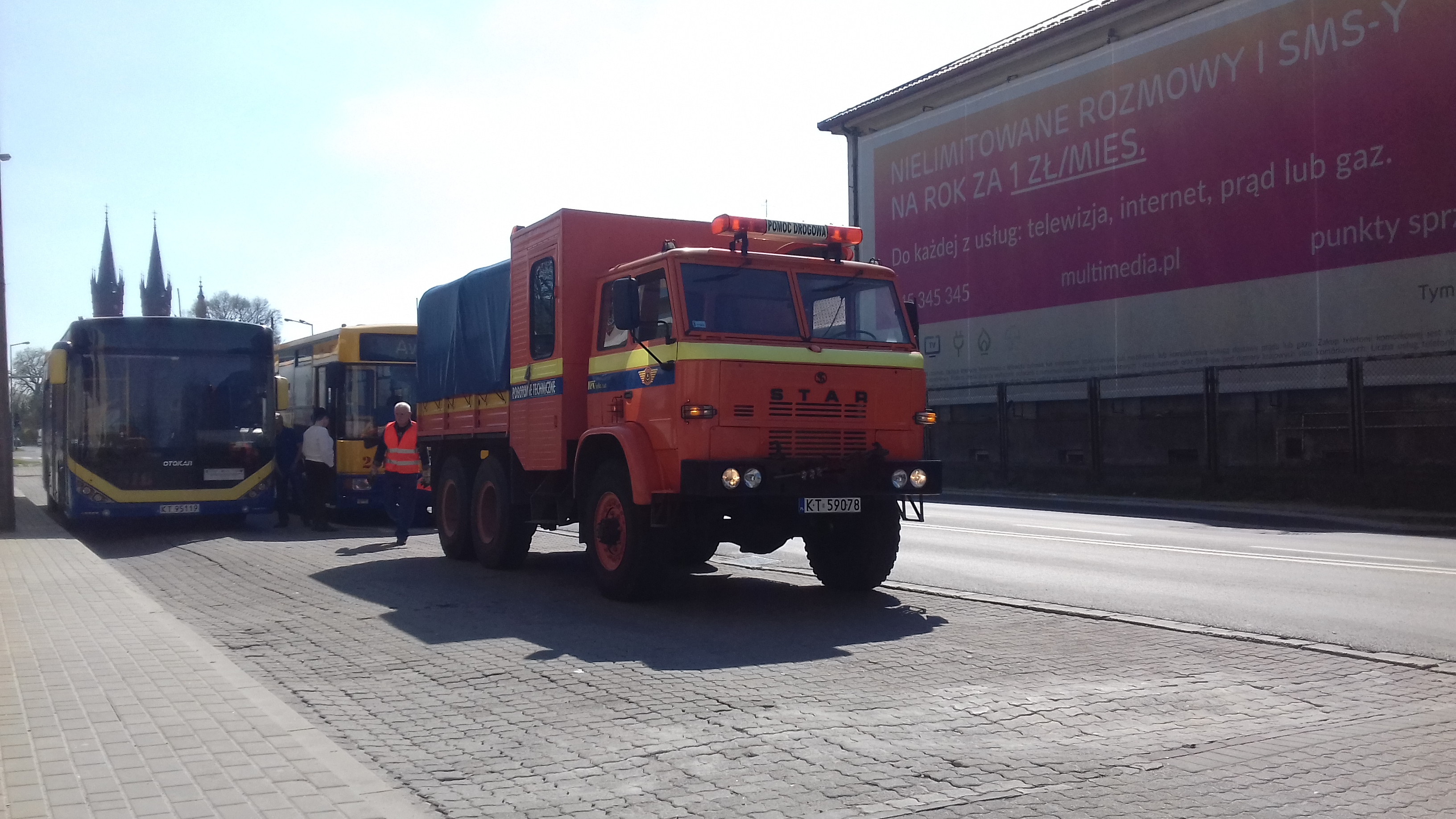 Pojazd techniczny Miejskiego Przedsiębiors5wa Komunikacyjnego w Tarnowie marki Star. Zdjęcie wykonane na pętli Szkotnik-Plac.